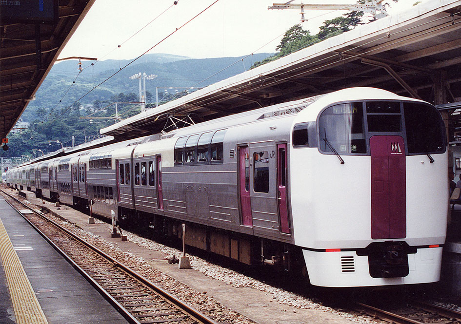 JR東日本 215系電車